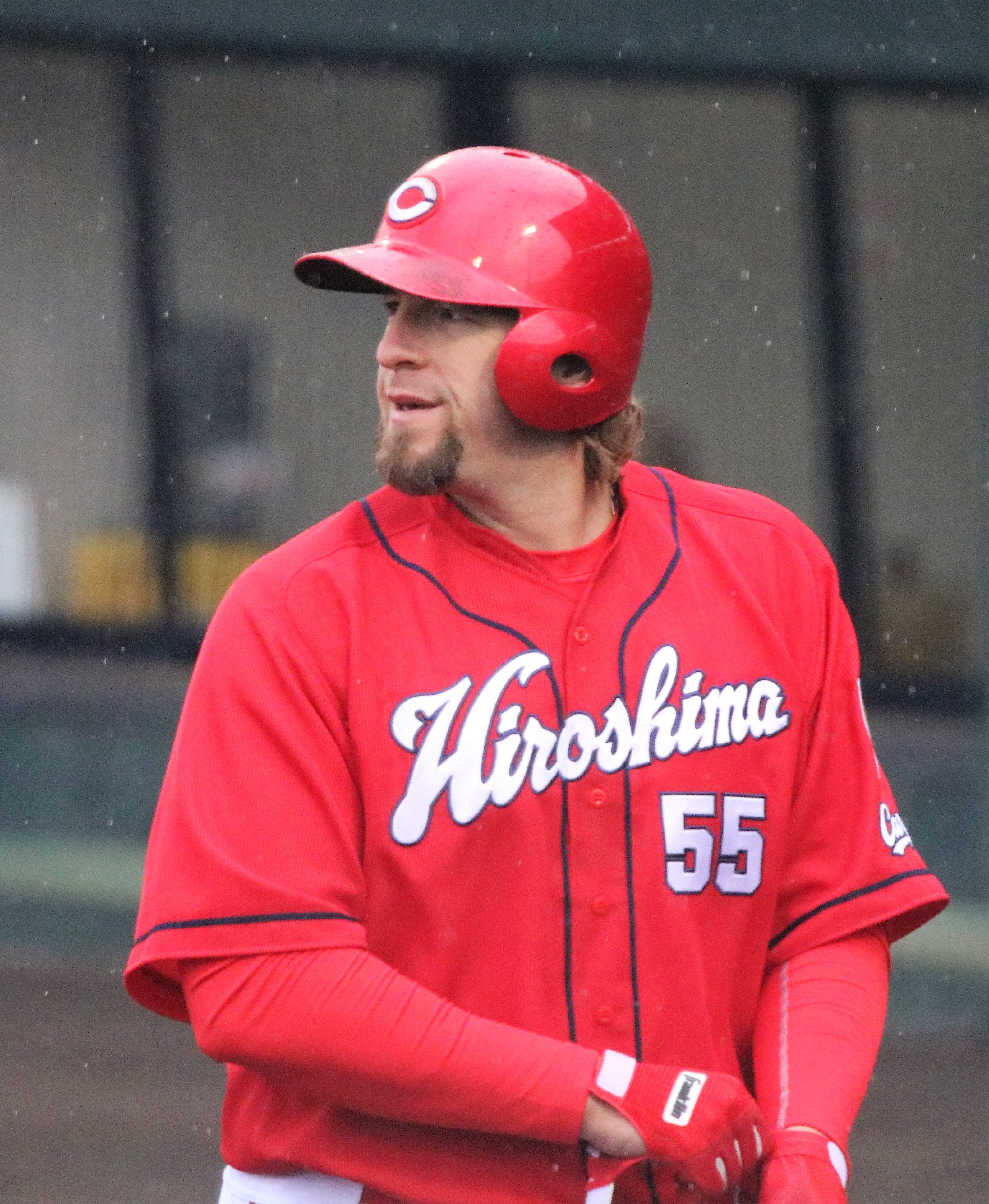 2018/3/3 佐賀県立森林公園野球場